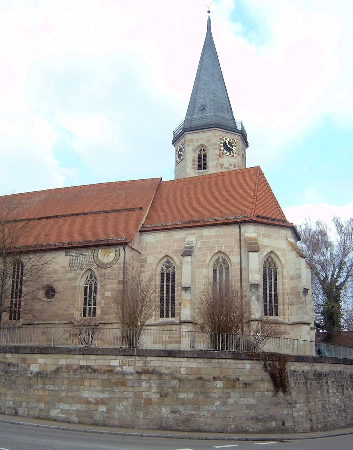 Die evangelische Afrakirche in Urbach (Rems), eine gotische Wehrkirche von 1509